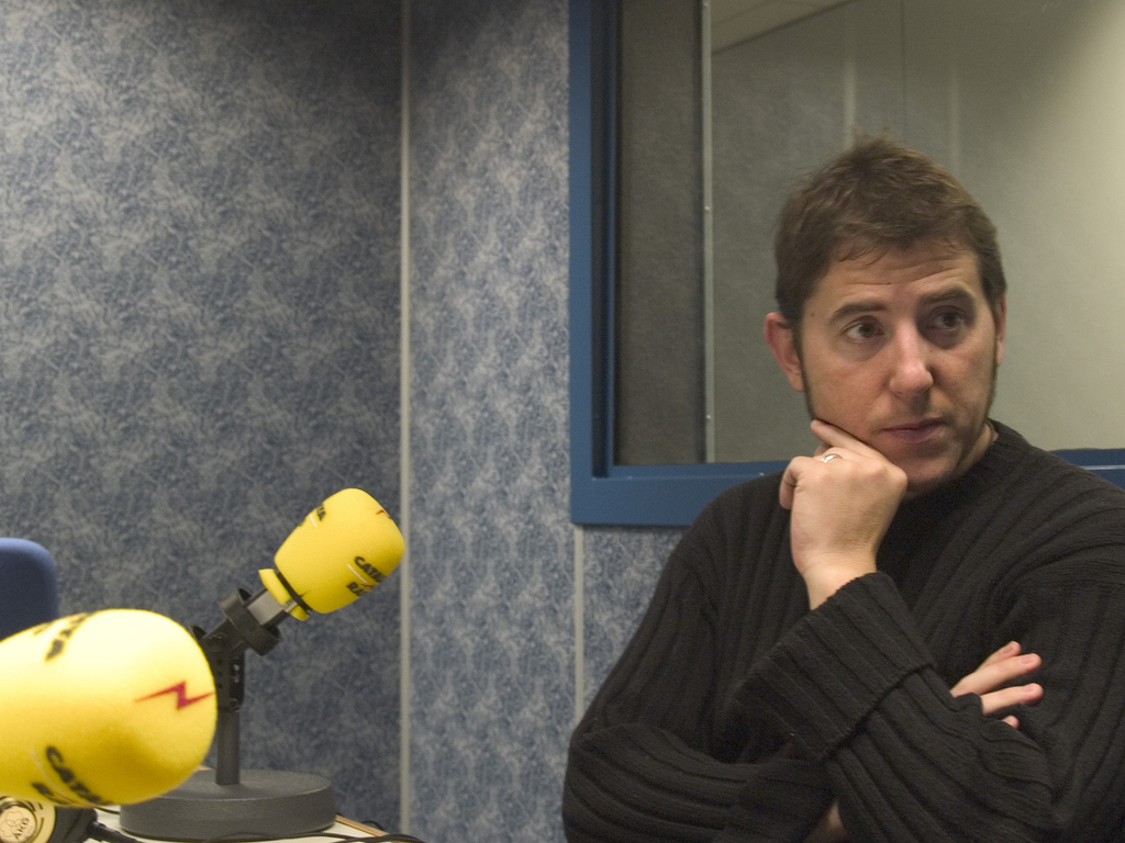 Entrevista per a la Revistacampus de la UAB